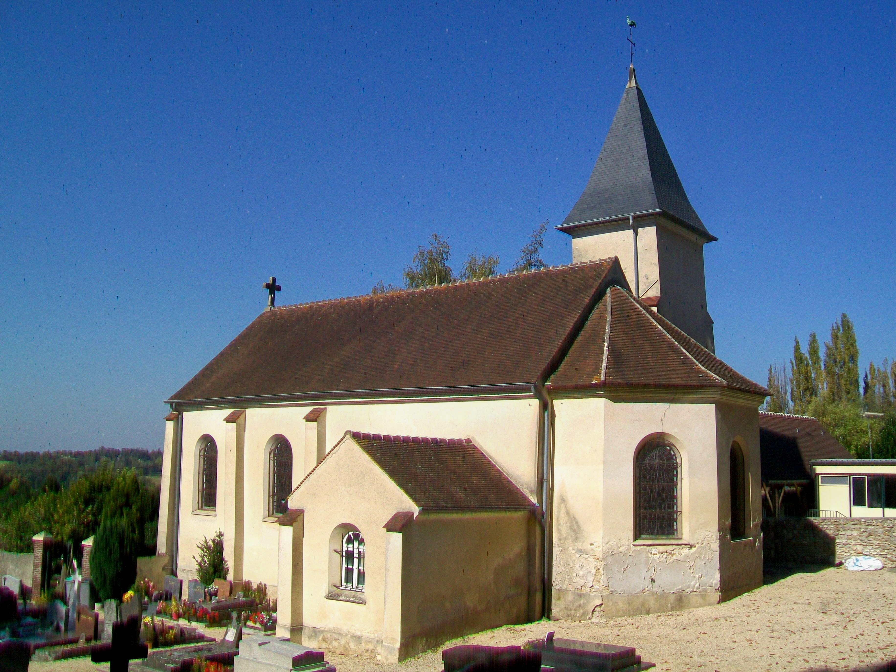 L'église Notre-Dame de la Pitié, du XIXe siècle, place de la Mairie.